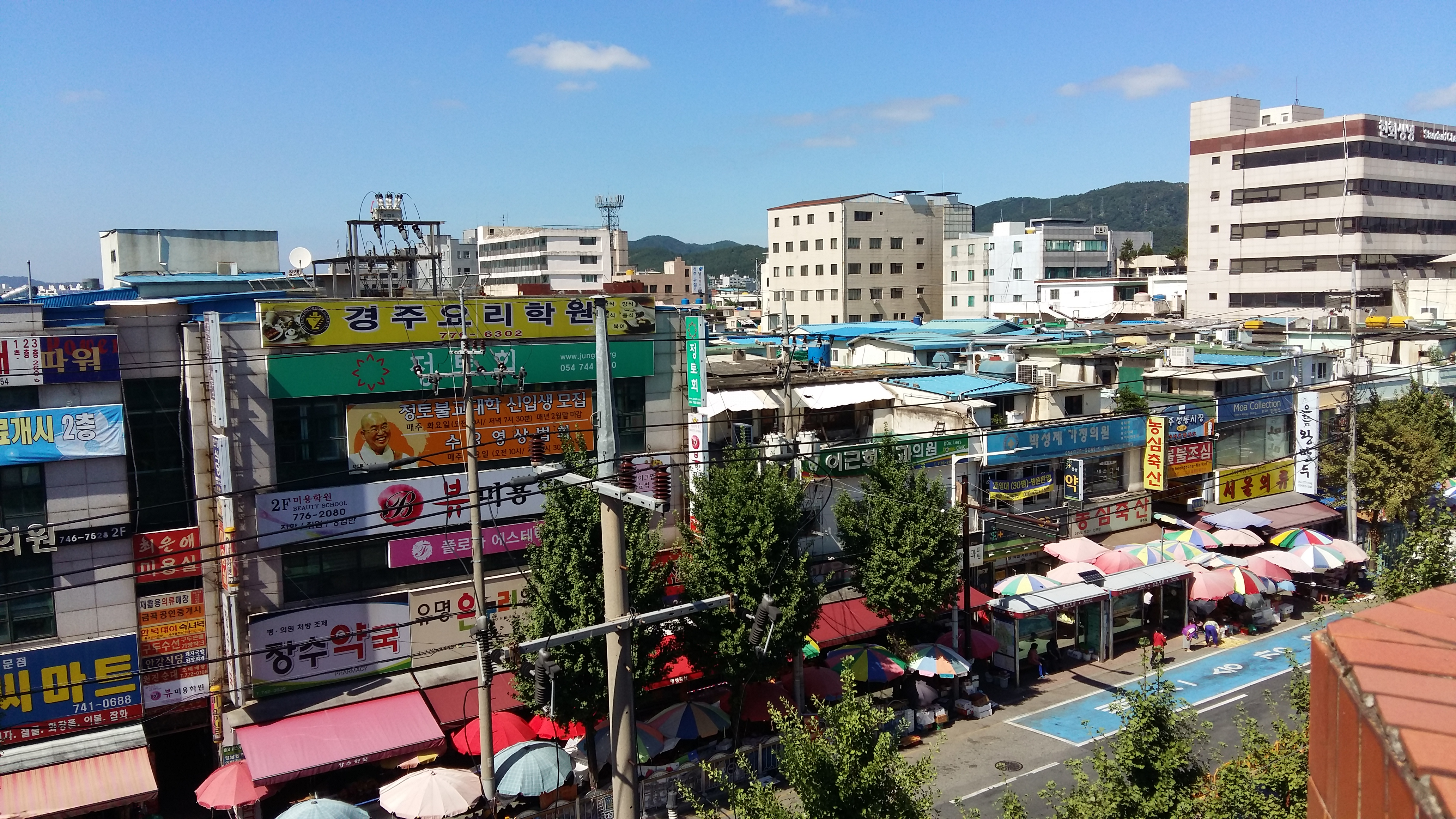 경주 성동동 일대